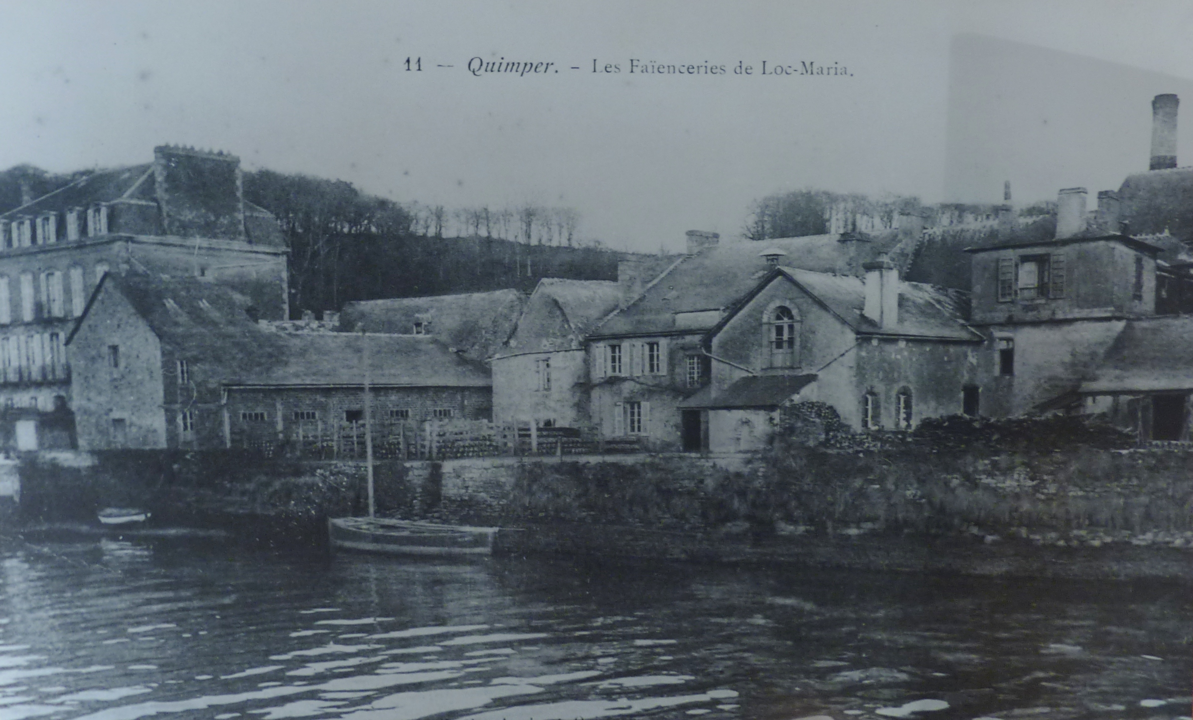 Quimper : les faïenceries de Locmaria au début du XXème siècle (auteur inconnu)